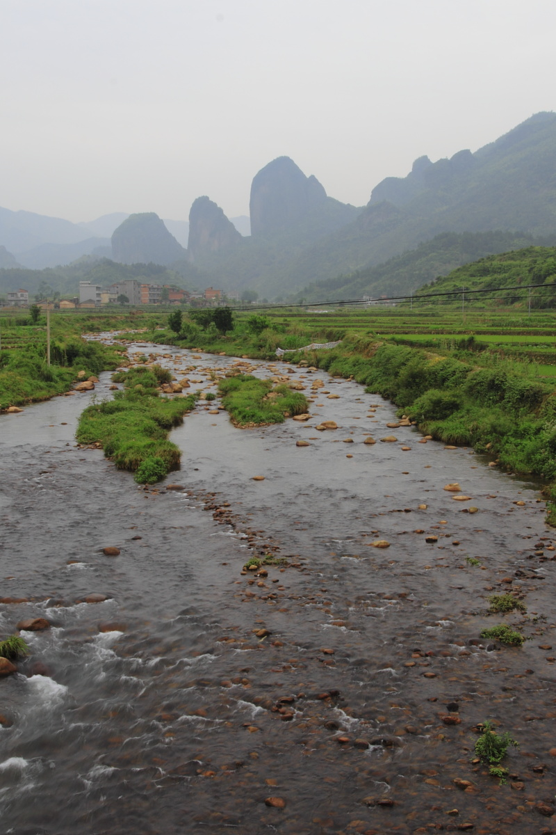 六石岩，位于江西省广丰县。